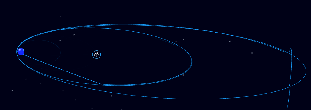 מסלול הגשושית בראשית סביב כדור הארץ